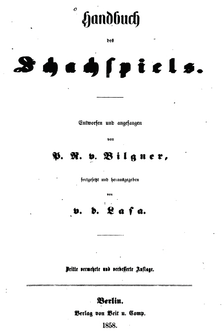 Handbuch des Schachspiels, vydání z roku 1858 Zdroj Má vlastní práce